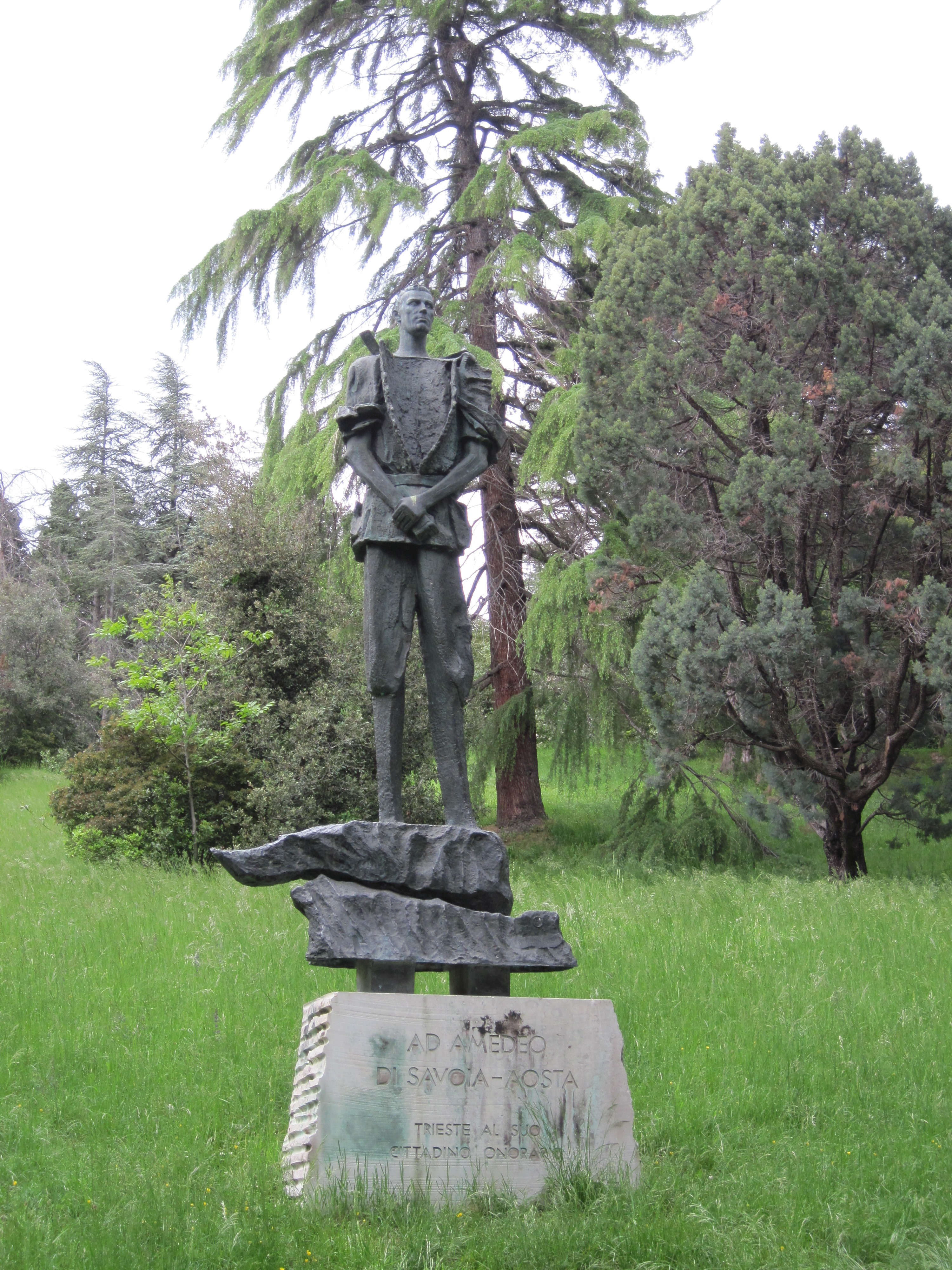 Riserva Naturale Marina di Miramare: parco del castello - Trieste (ID monumento: 03200633) This is a photo of a monument which is part of cultural heritage of Italy. The authorisation for taking photos of this object was provided by the World Wide Fund for Nature Italy.